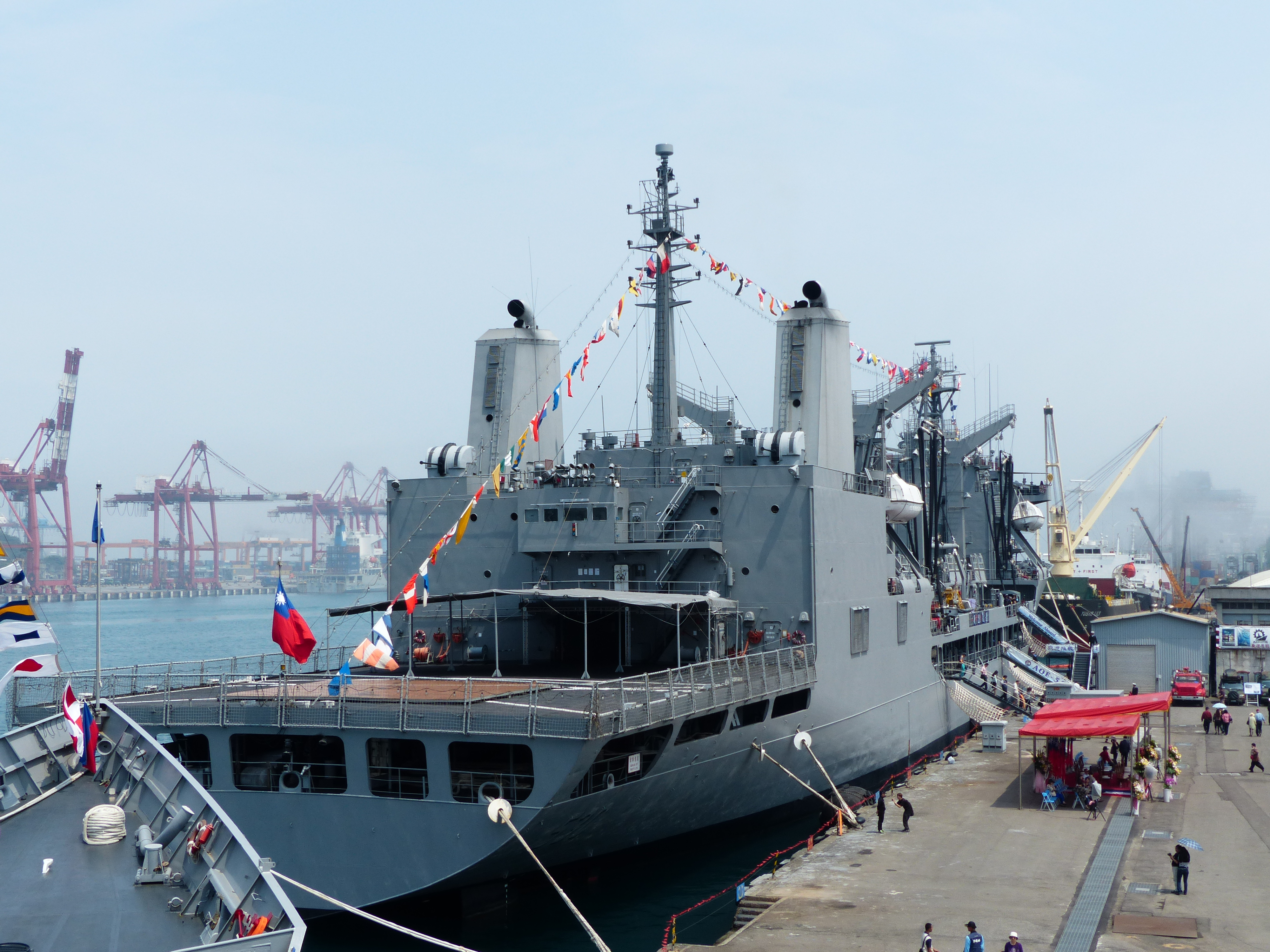 從巡防艦子儀（PFG-1107）艦首遠望油彈補給艦武夷（AOE-530）左舷後方。